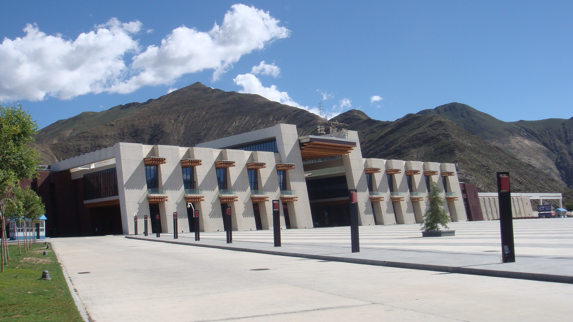 中国西藏拉萨市 China Lhasa Tibet China Xinjiang Urumqi Welcome you to tour the, Китай Синьцзяна Урумчи приветствовать Вас на экскурсию, الصين ترحب زيارتك لاورومتشى فى شينجيانغ, 中国新疆のウルムチへの訪問を歓迎する, 中国新疆乌鲁木齐欢迎您来观光旅游，